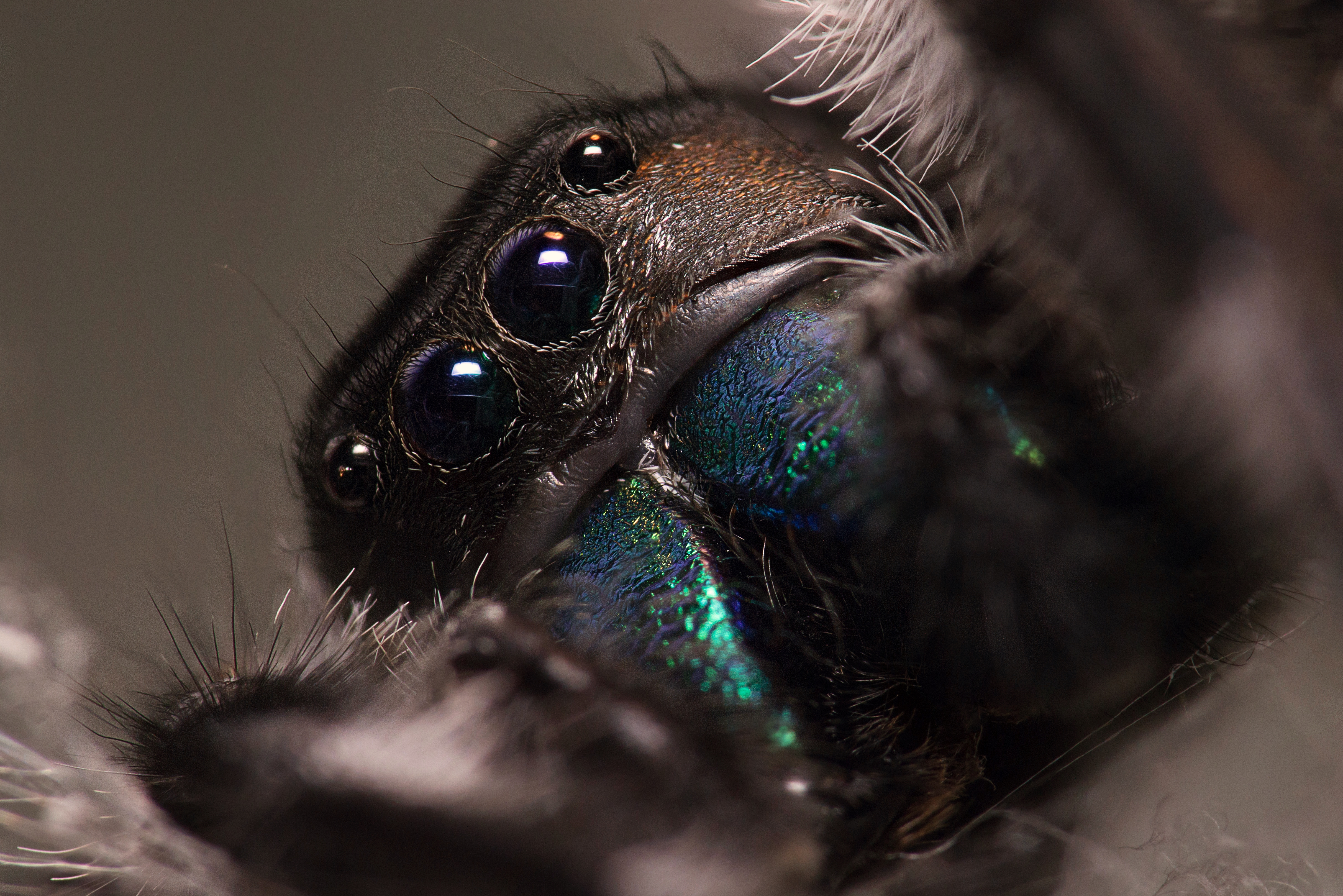 Phidippus regius, männchen mit den typischen blaugrün schimmernden Cheliceren